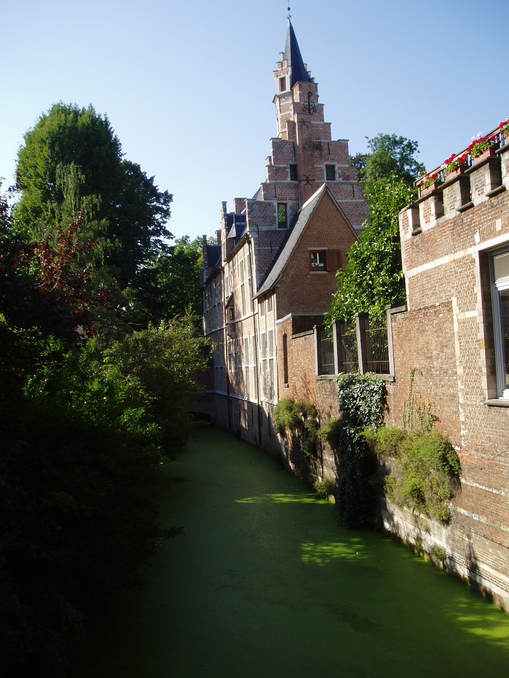 View on still river in city of Mechelen, Belgium named Groen Waterke (small green waterplace).